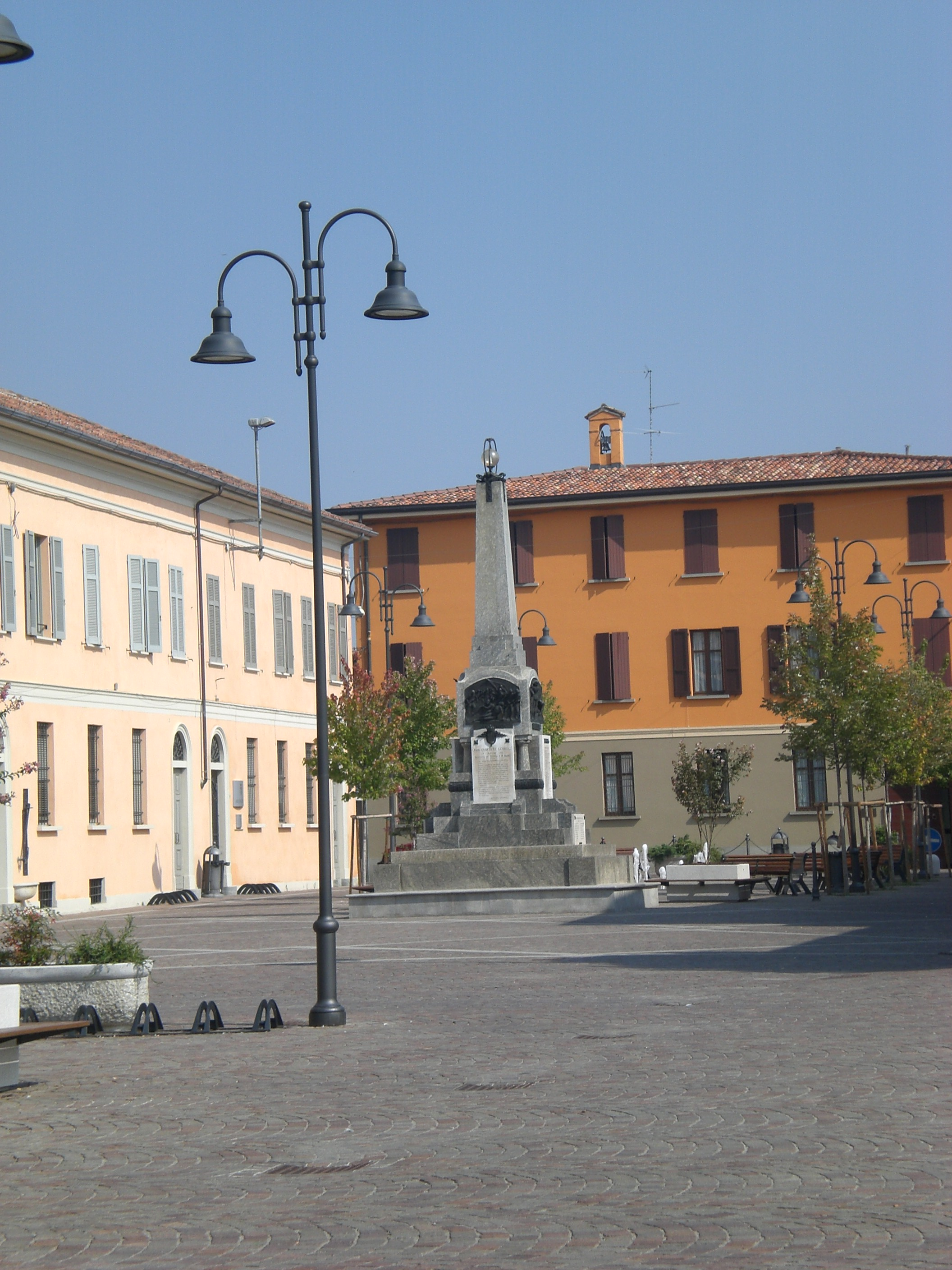 Brisckerly Opera sua Offanengo